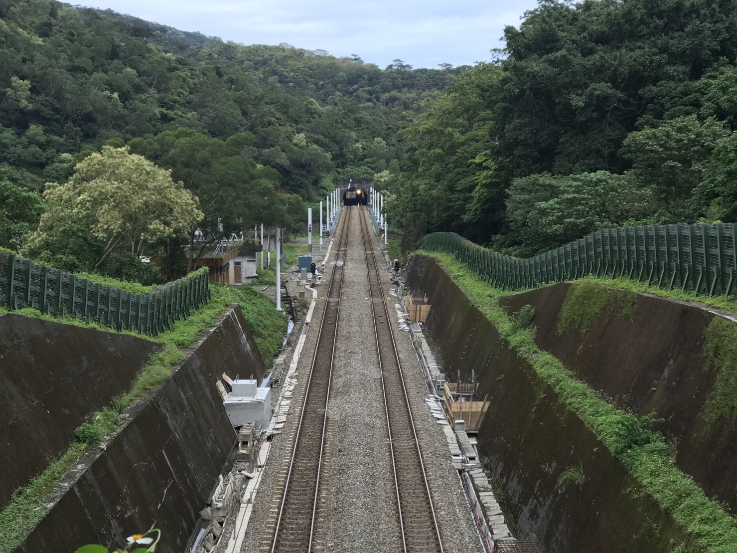 臺鐵南迴線鐵路菩安隧道至中央隧道雙軌化區間